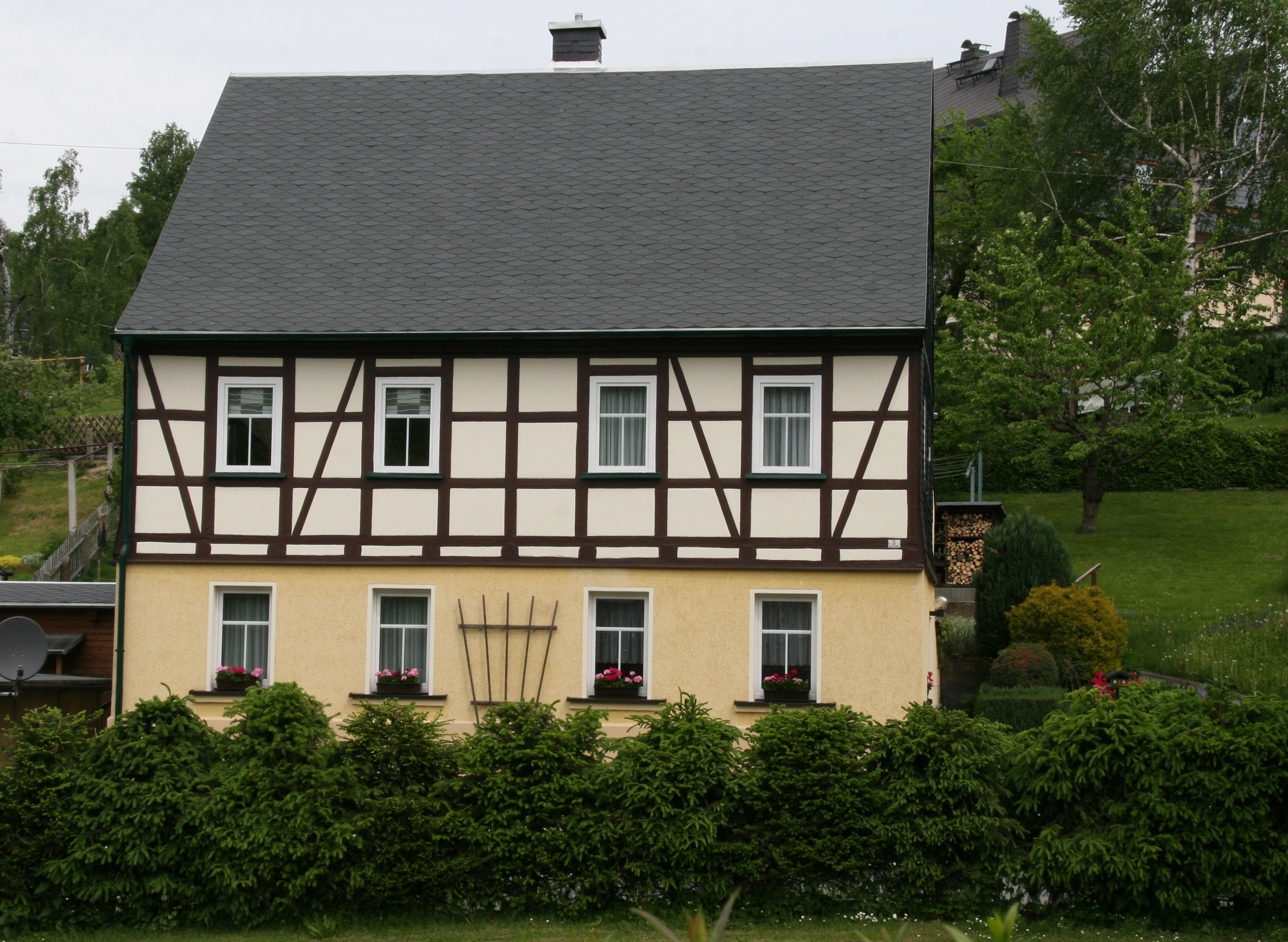 Kulturdenkmal 09238150 in Auerbach: Häuslerhaus; regionaltypischer Bau, Teil der alten Ortsstruktur, als Ausgangspunkt der Wielandschen Textilproduktion von ortshistorischer Bedeutung.